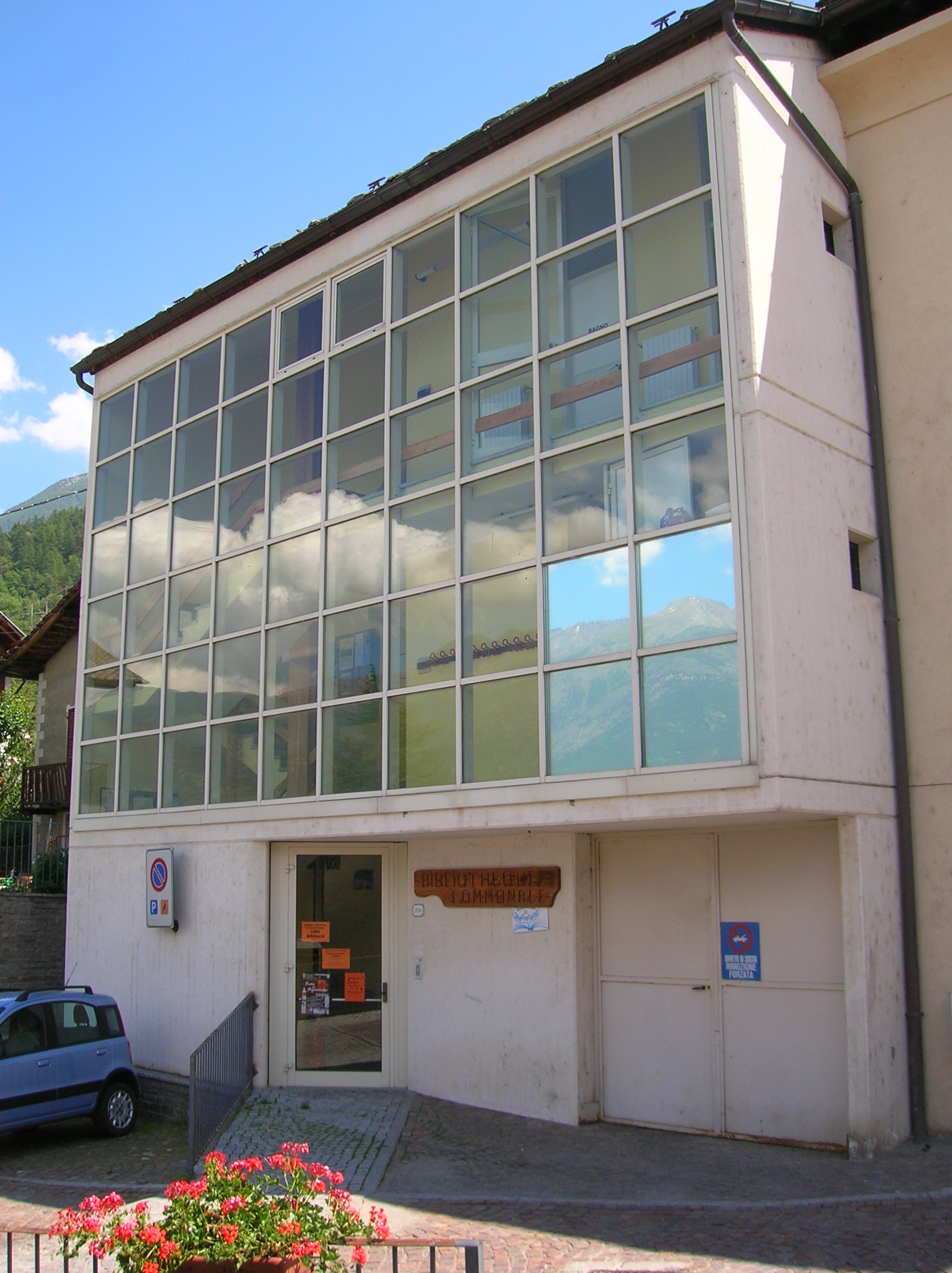 Biblioteca di Charvensod, Valle d'Aosta, Italia.